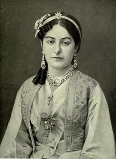 La reina Natalia de Serbia en traje tradicional.